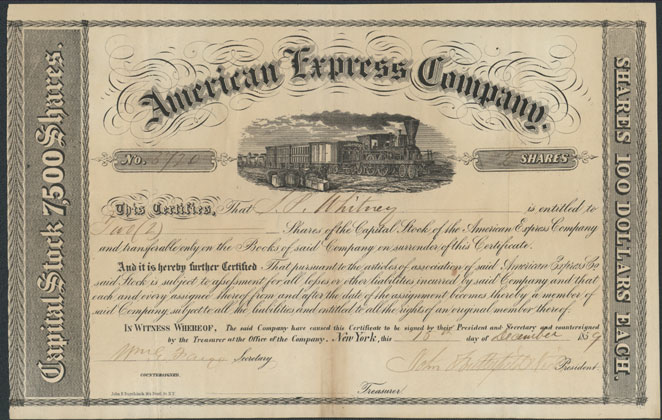 Aktie der American Express Company vom 15. Dezember 1859